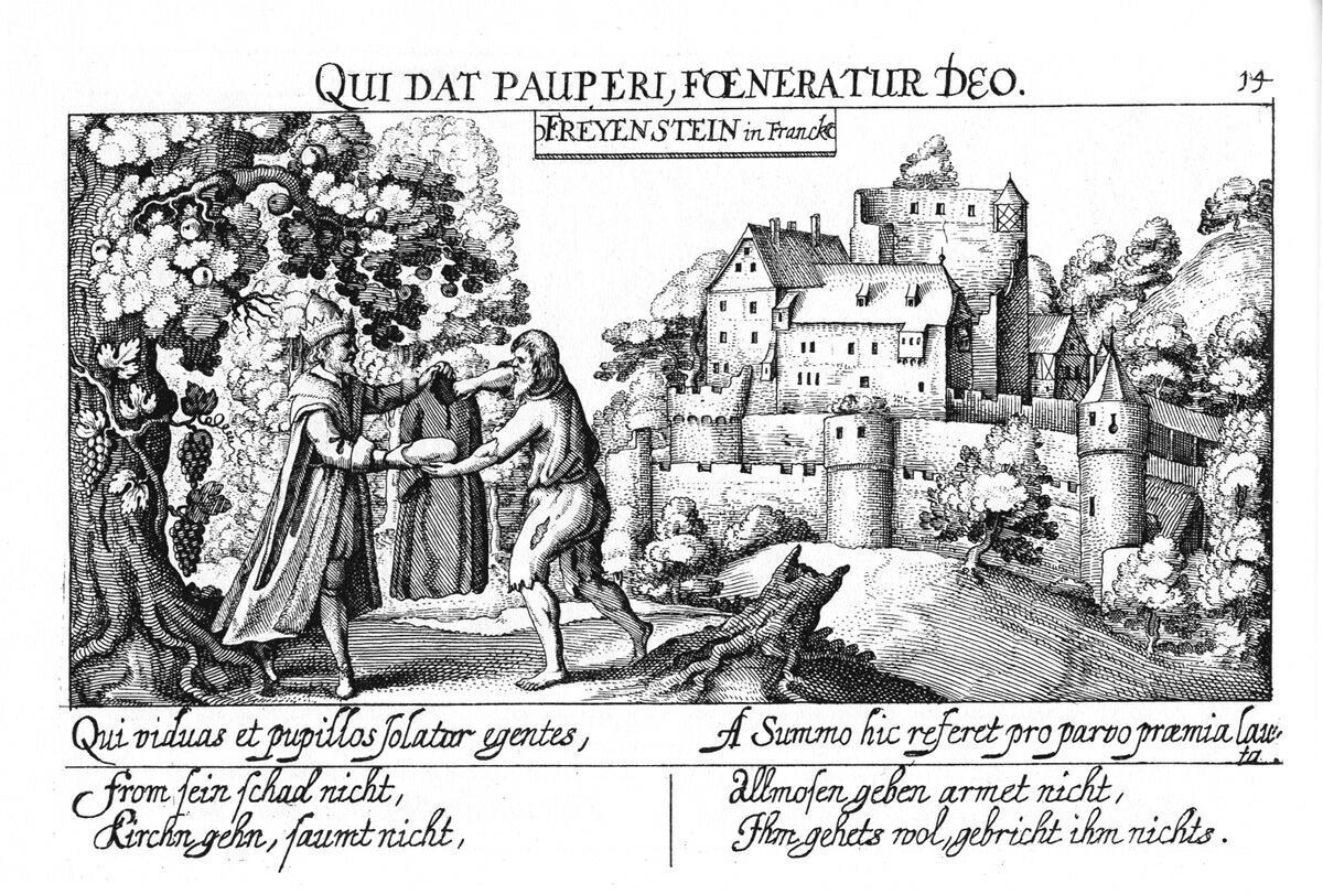 Ansicht der Burg Freienstein, aus Daniel Meisner/ Eberhard Kieser: Thesaurus Philopoliticus oder Politisches Schatzkästlein Bd. 2, Faksimile-Neudruck der Ausgabe Frankfurt/ Main 1625-1626 u. 1627-1631, Nördlingen 1992, Buch 3, Nr. 14